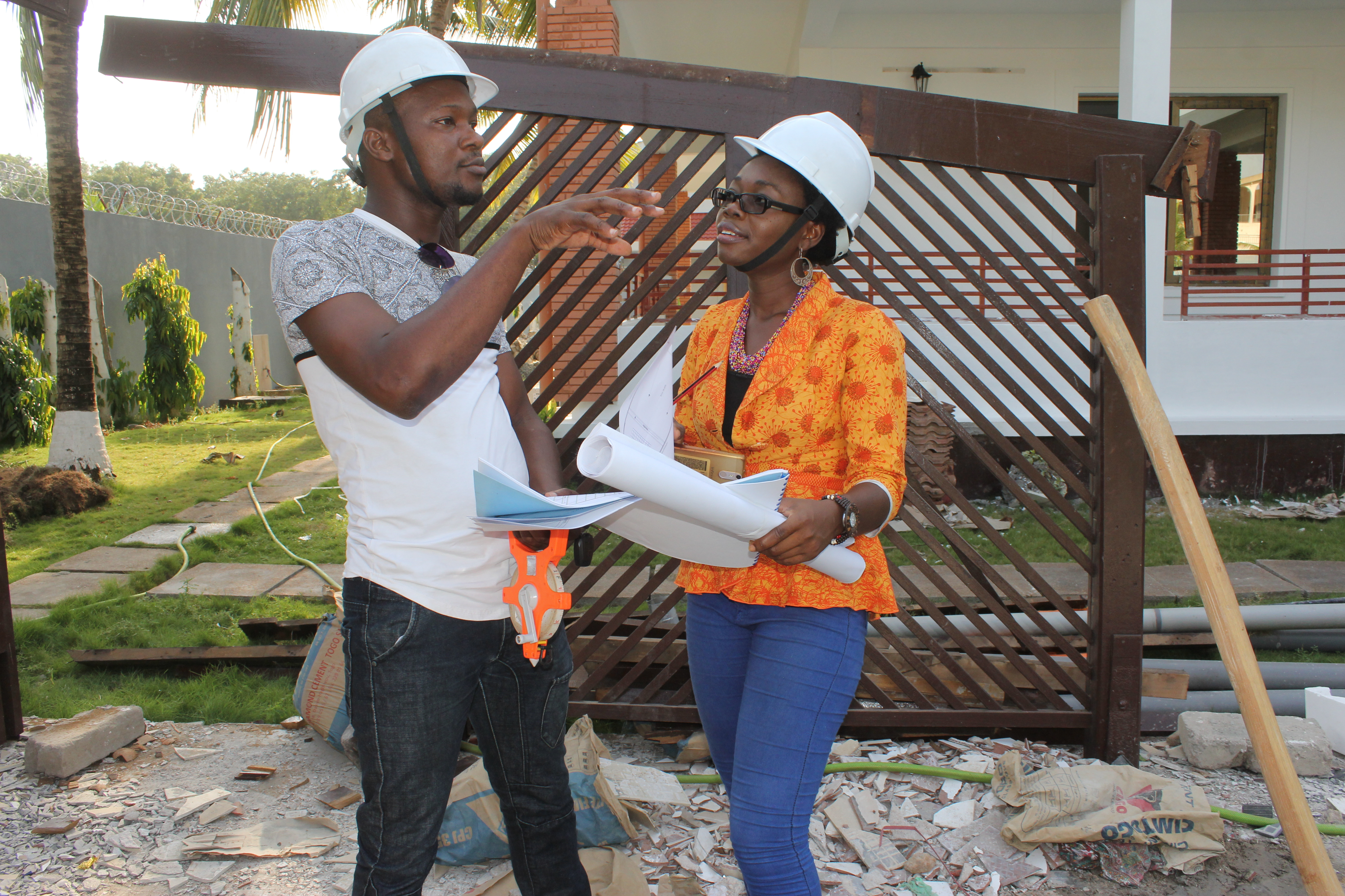 Une femme Architecte Urbaniste qui discute de l'exécution d'un chantier avec son assistant. This is an image of "African people at work" from Togo